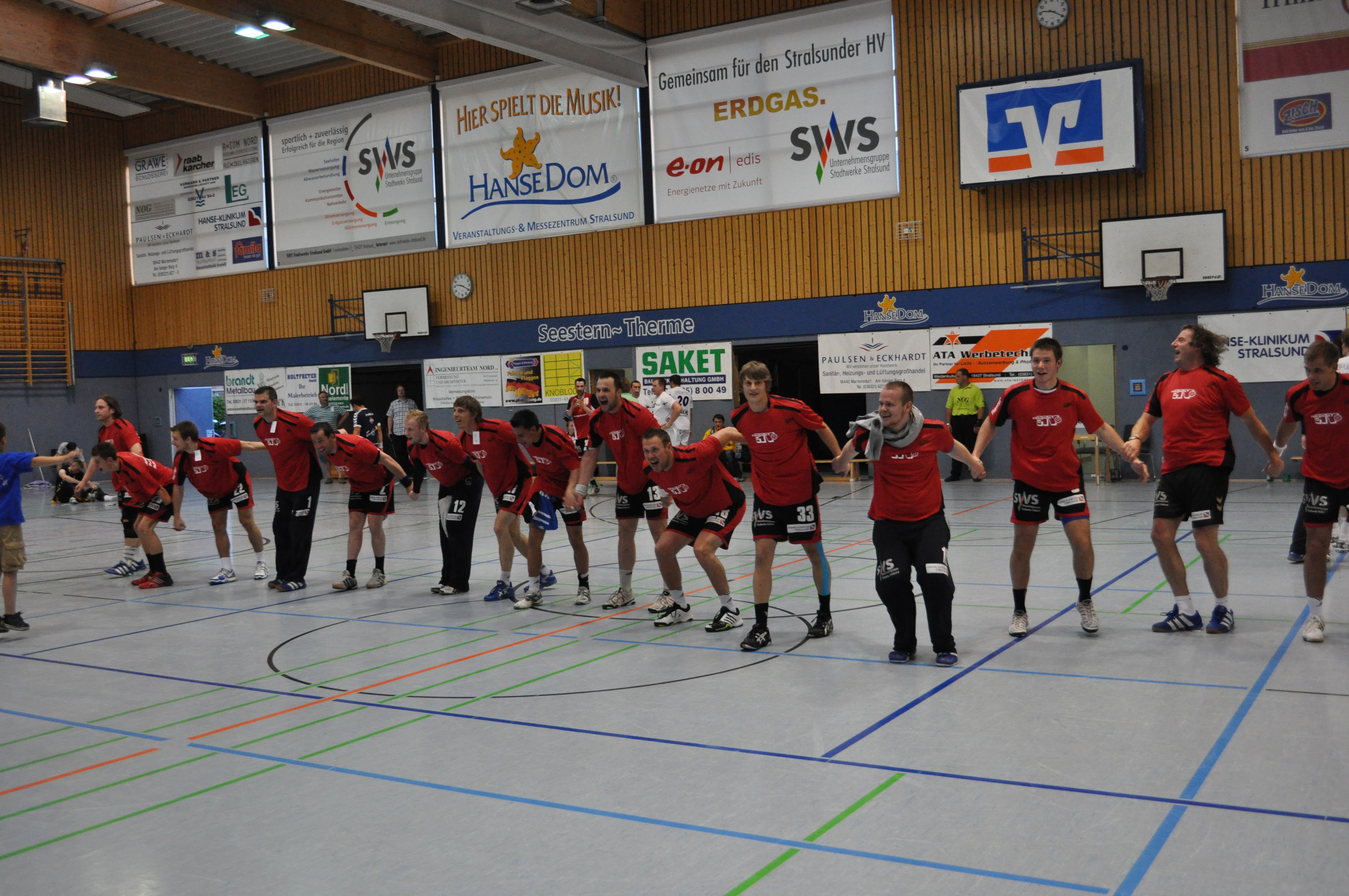 Die Mannschaft des Stralsunder Handballvereins nach dem Gewinn auch des zweiten Relegationsspiels um den Aufstieg in die 3. Handball-Liga gegen den HC Neuruppin am 5. Juni 2010 (29:26).